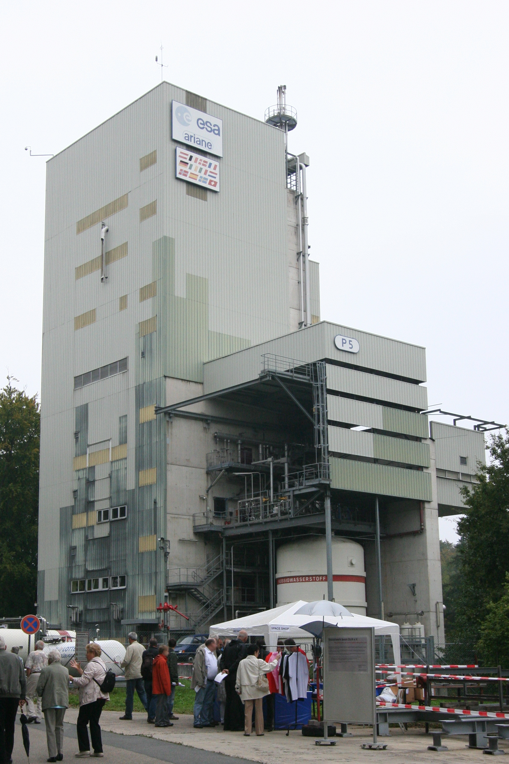 Prüfstand P5 am DLR-Standort Lampoldshausen